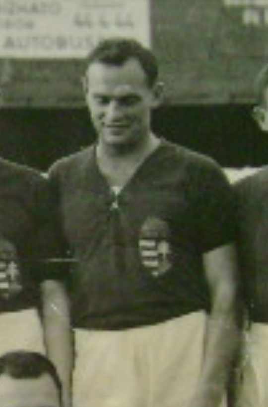 Sándor Bíró (ca. 1936-38)